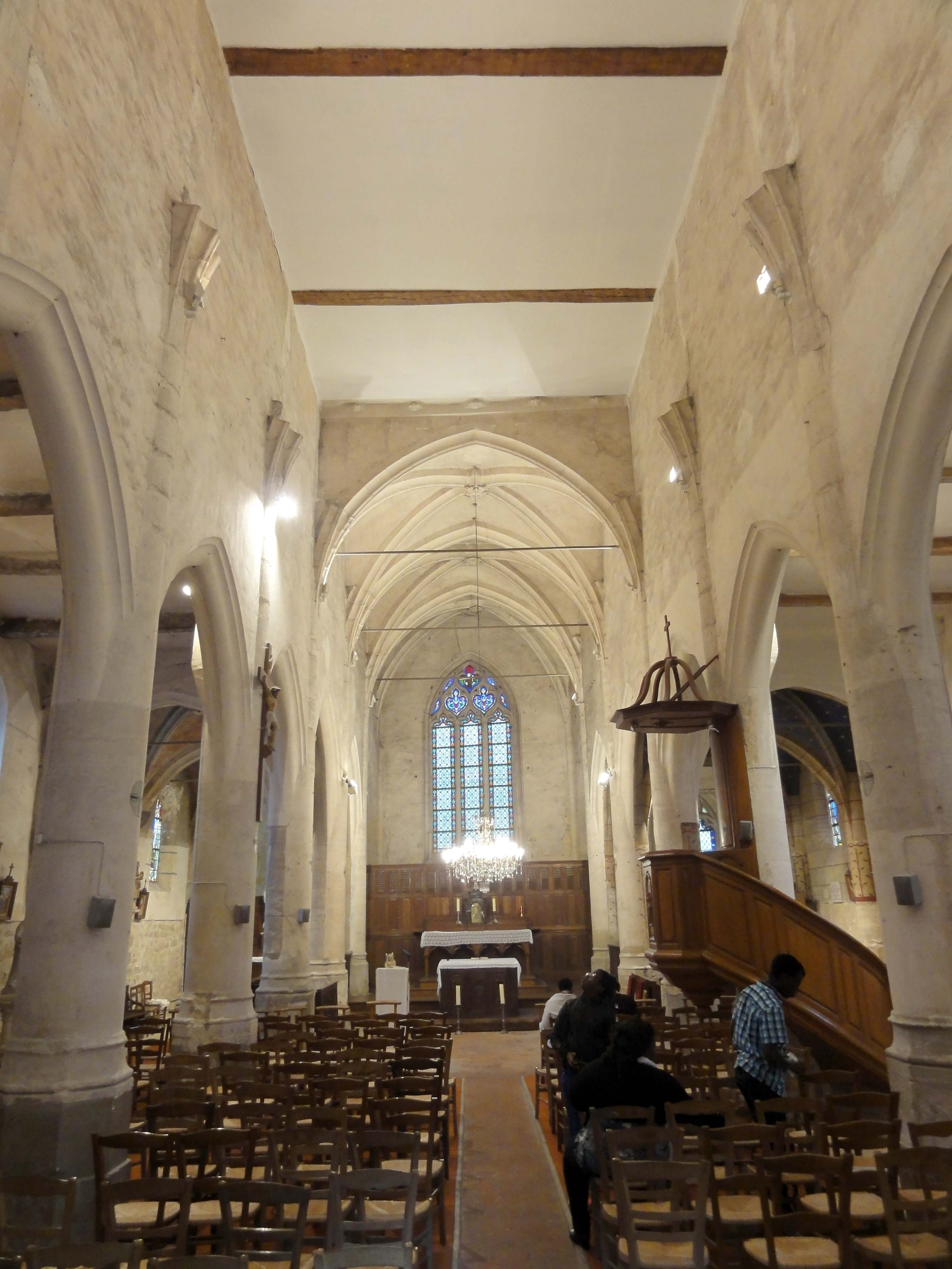 Intérieur de l'église de l'Assomption de Notre-Dame - voir titre.